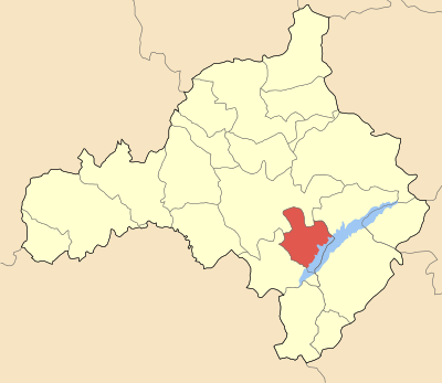 Locator map of Elimeias municipality (Δήμος Ελιμείας) at Kozani perfecture, Greece.